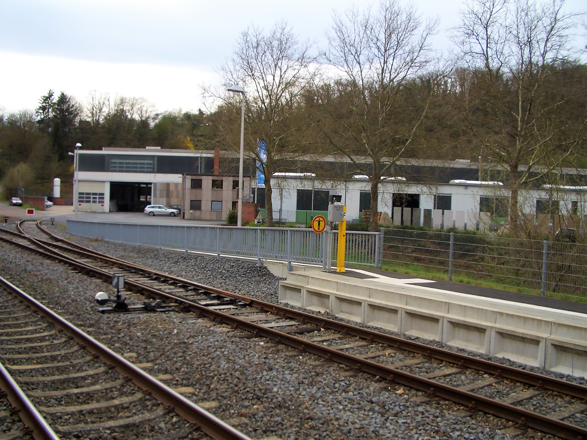 Bf Gamburg(Tauber) mit Anschlussgleis zur Firma Hofmann mit der Handweiche, Schlössern und Schaltkasten ÖBE. Am Ende des Bahnsteig 2 ist die behindertengerechte Zuwegung zu sehen.